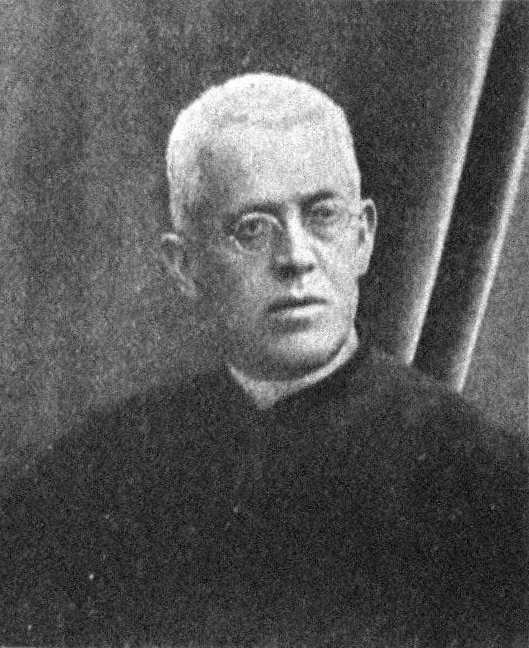 Österreichischer Politiker, Reichsratswahl 1907, Name siehe Dateiname